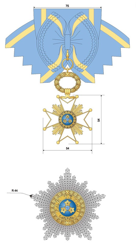 Triju Zvaigžņu ordenis